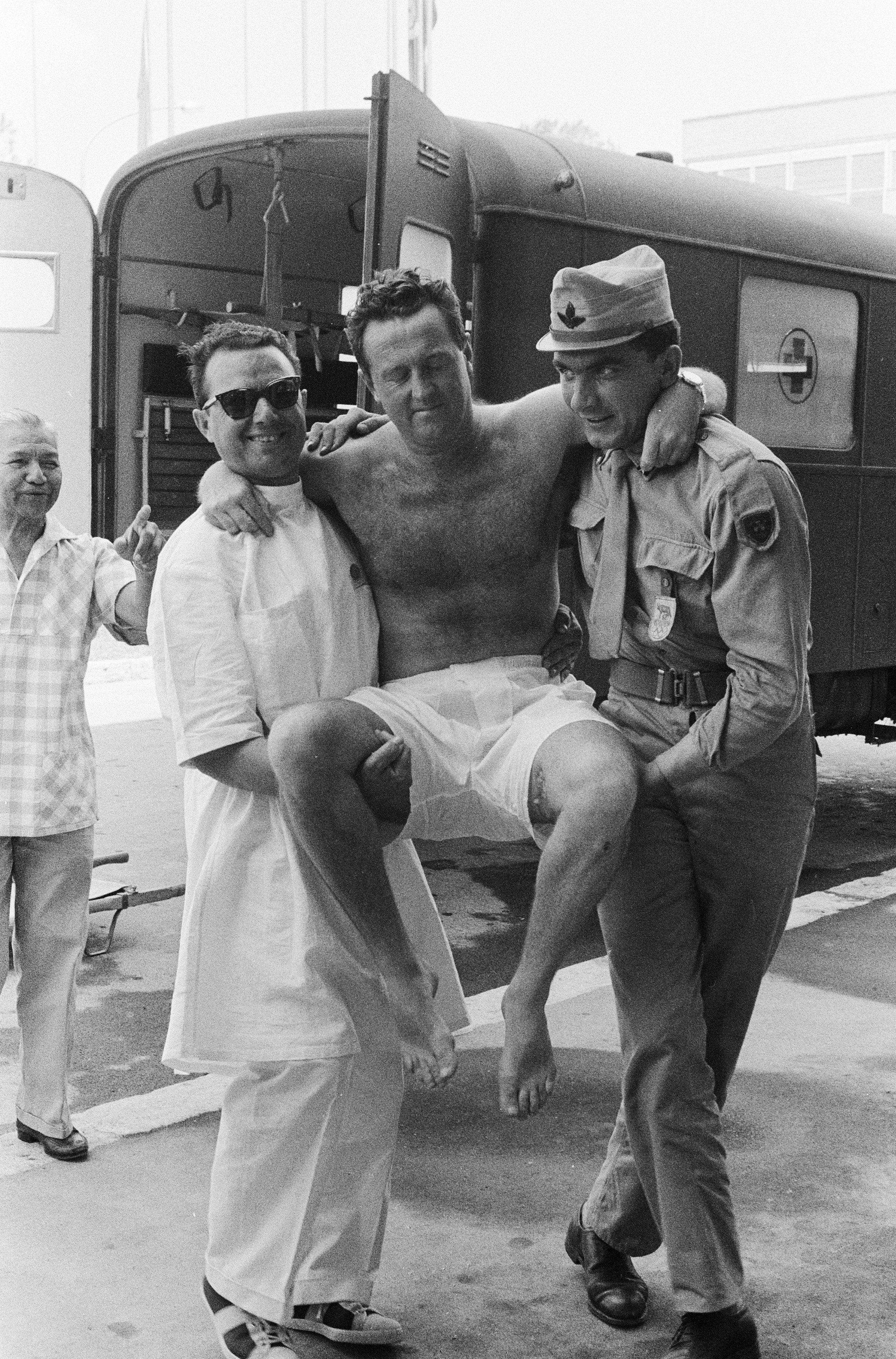 Collectie / Archief : Fotocollectie Anefo Reportage / Serie : [ onbekend ] Beschrijving : Olympische Spelen te Rome, Waterpolocoach Cor Braasem wordt i.v.m. zijn ongeluk gedragen Datum : 23 augustus 1960 Locatie : Rome Trefwoorden : trainers Persoonsnaam : Braasem, Co Fotograaf : Pot, Harry / Anefo Auteursrechthebbende : Nationaal Archief Materiaalsoort : Negatief (zwart/wit) Nummer archiefinventaris : bekijk toegang 2.24.01.05 Bestanddeelnummer : 911-5249